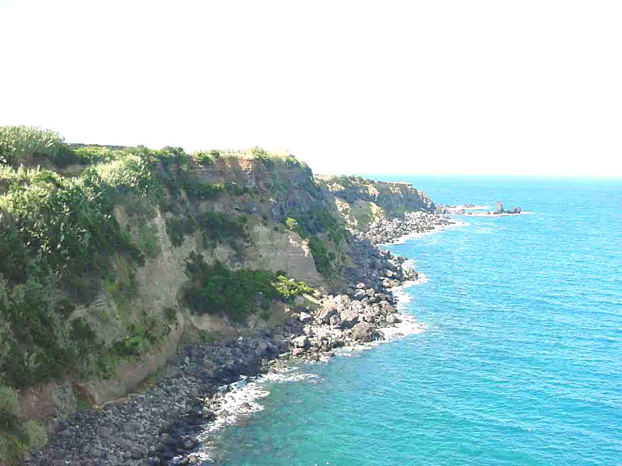 Costa da Vila Nova junto à Praia das Escaleiras, Praia da Vitória, ilha Terceira, Açores, Portugal.